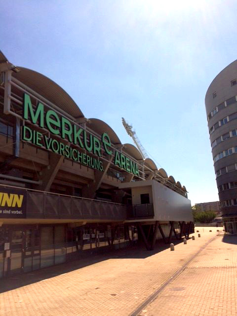 Die Merkur Arena mit Stadionturm